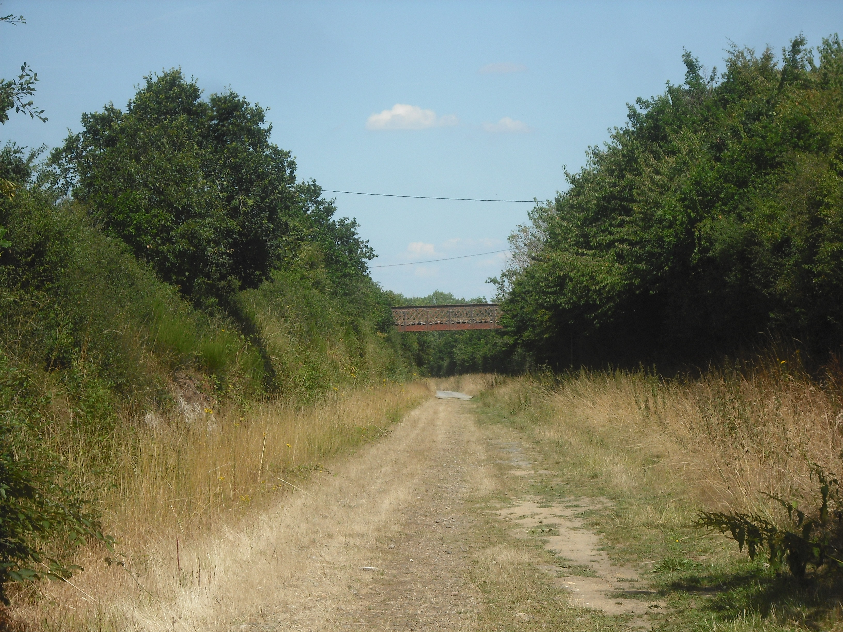 Ancienne ligne de Segré à Nantes, à Candé, Maine-et-Loire, France.